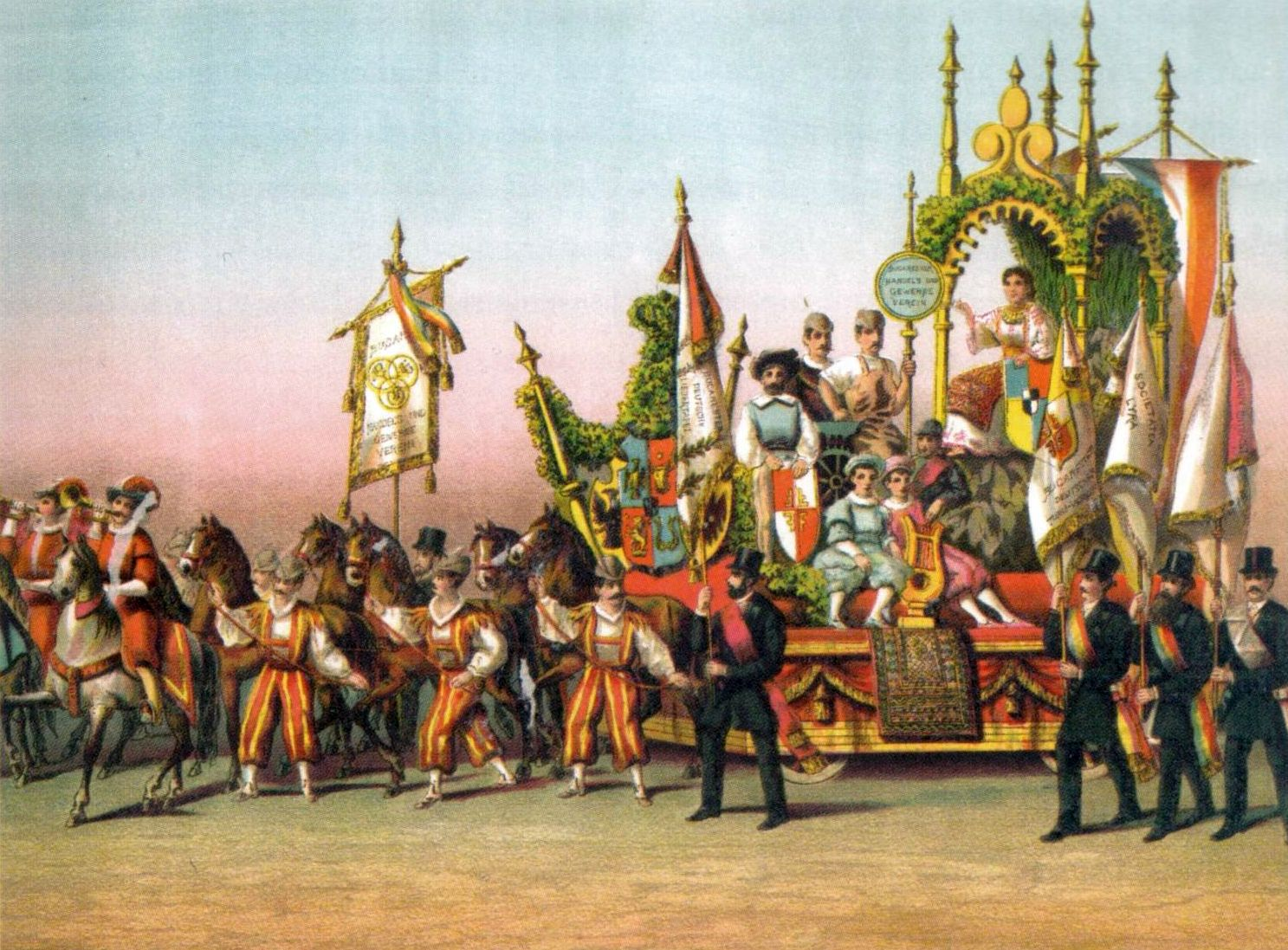 Carul Societăților Germane din București, cromolithografie din Albumul Carelor simbolice